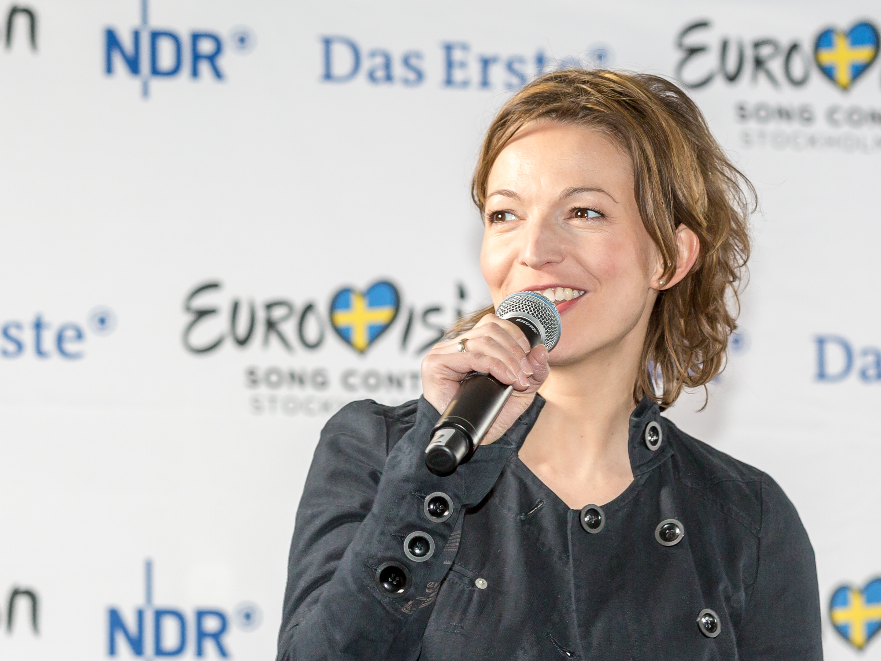 Unser Lied für Stockholm - Pressekonferenz am Probentag: Moderatorin Anna Planken